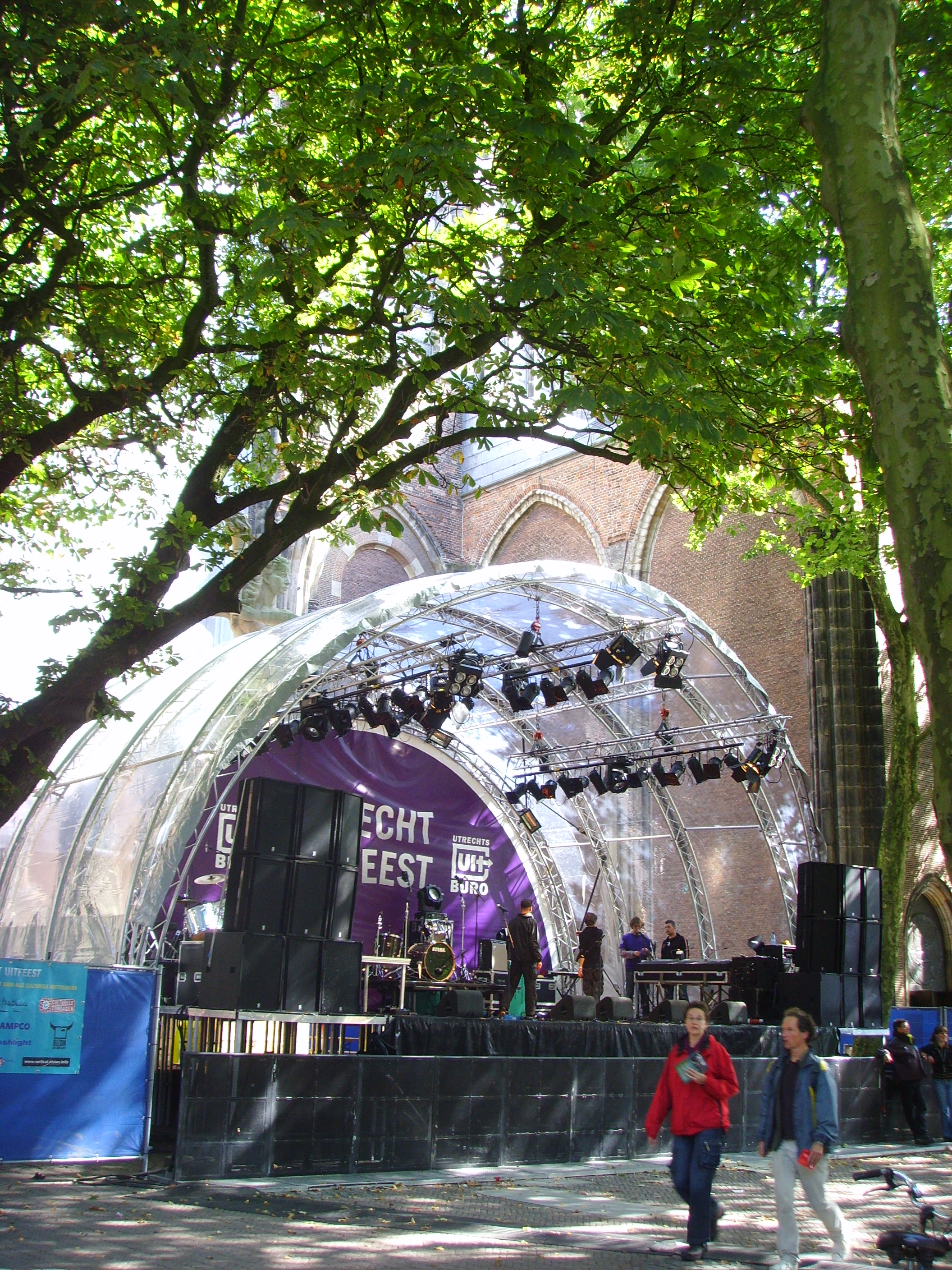 Muziekpodium op het Domplein tijdens het Utrecht Uitfeest